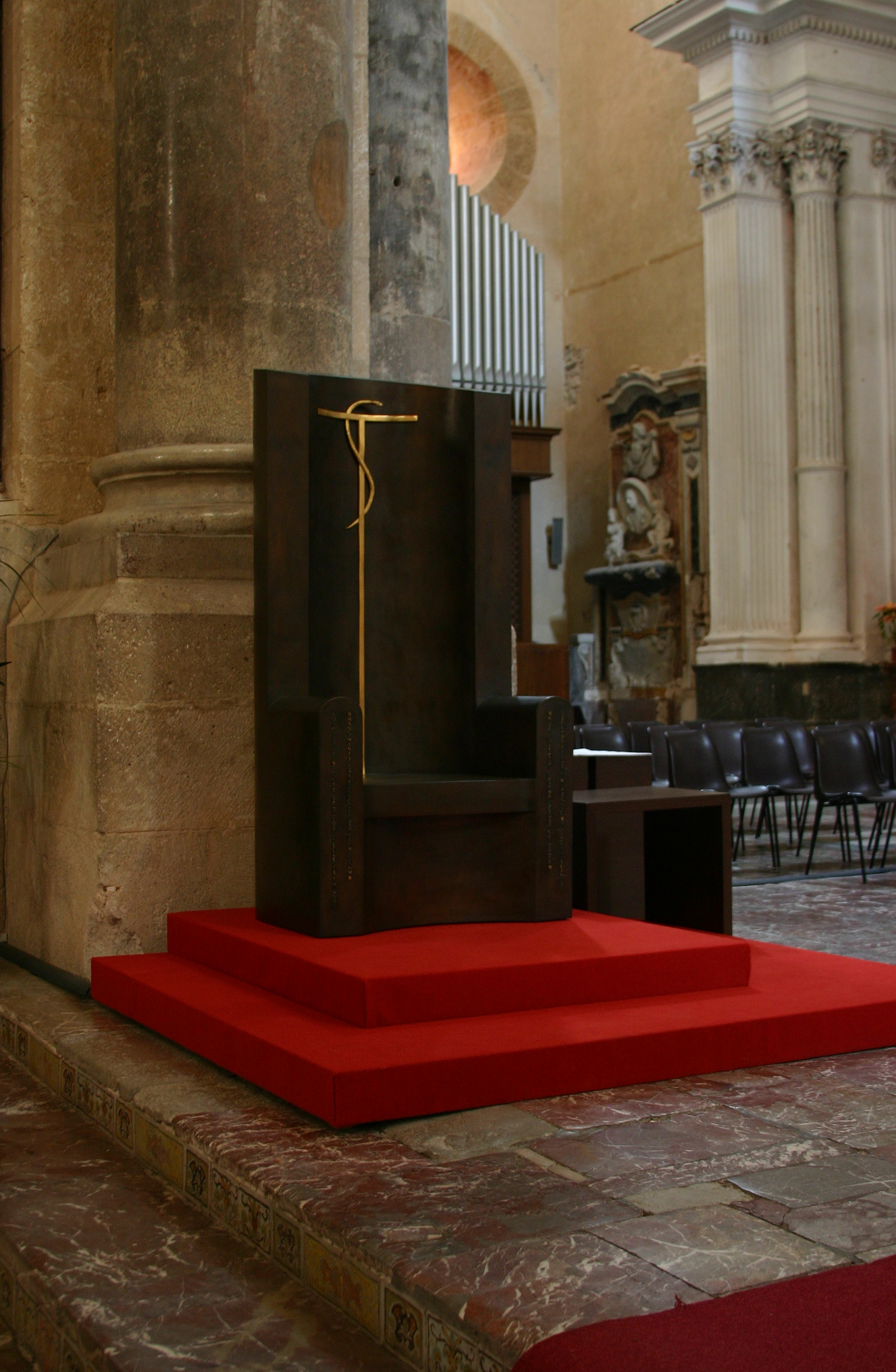 Cathedral of Cefalù